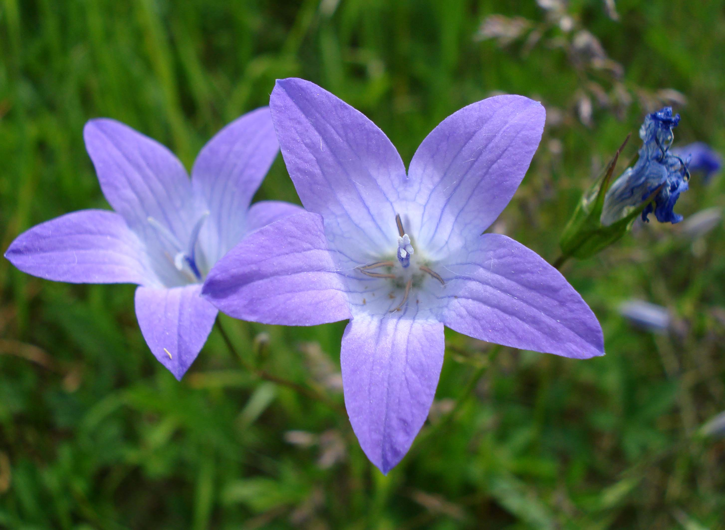 Campanula patula (Unterfranken, Germany)